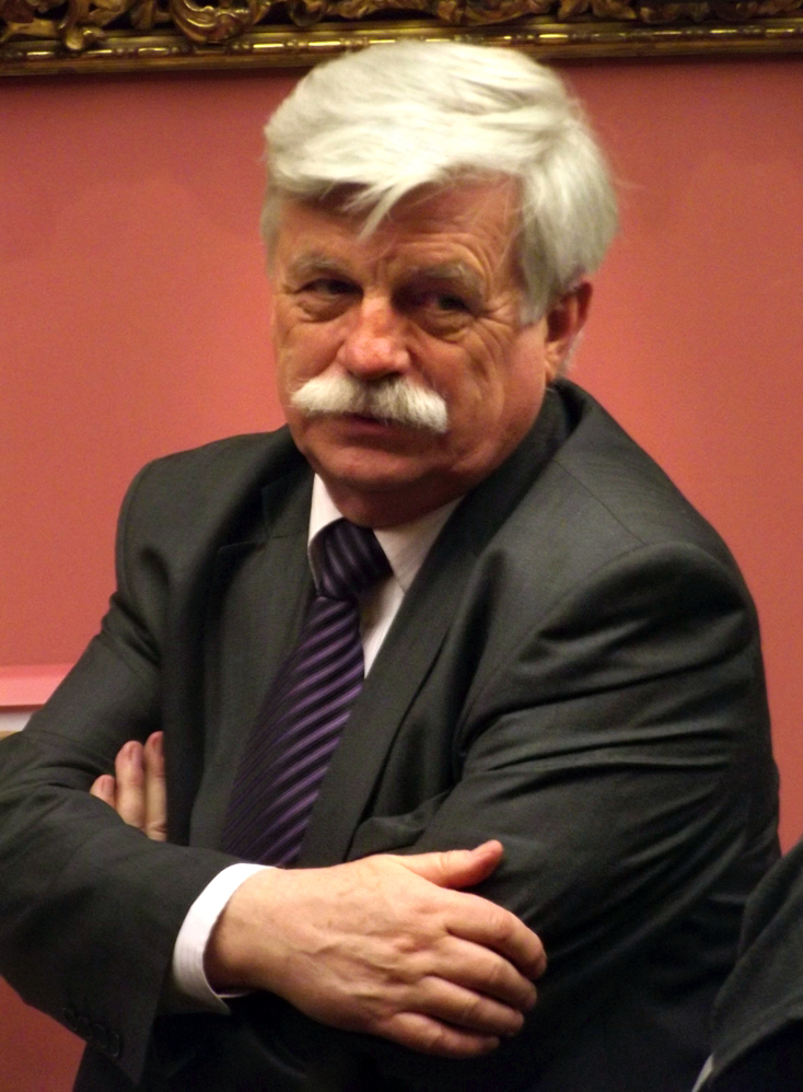 Prof. Franciszek Ziejka (1940-2020), historyk literatury. Zdjęcie zrobione podczas otwarcia wystawy "Szuflada Szymborskiej" w Muzeum Narodowym w krakowskich Sukiennicach.